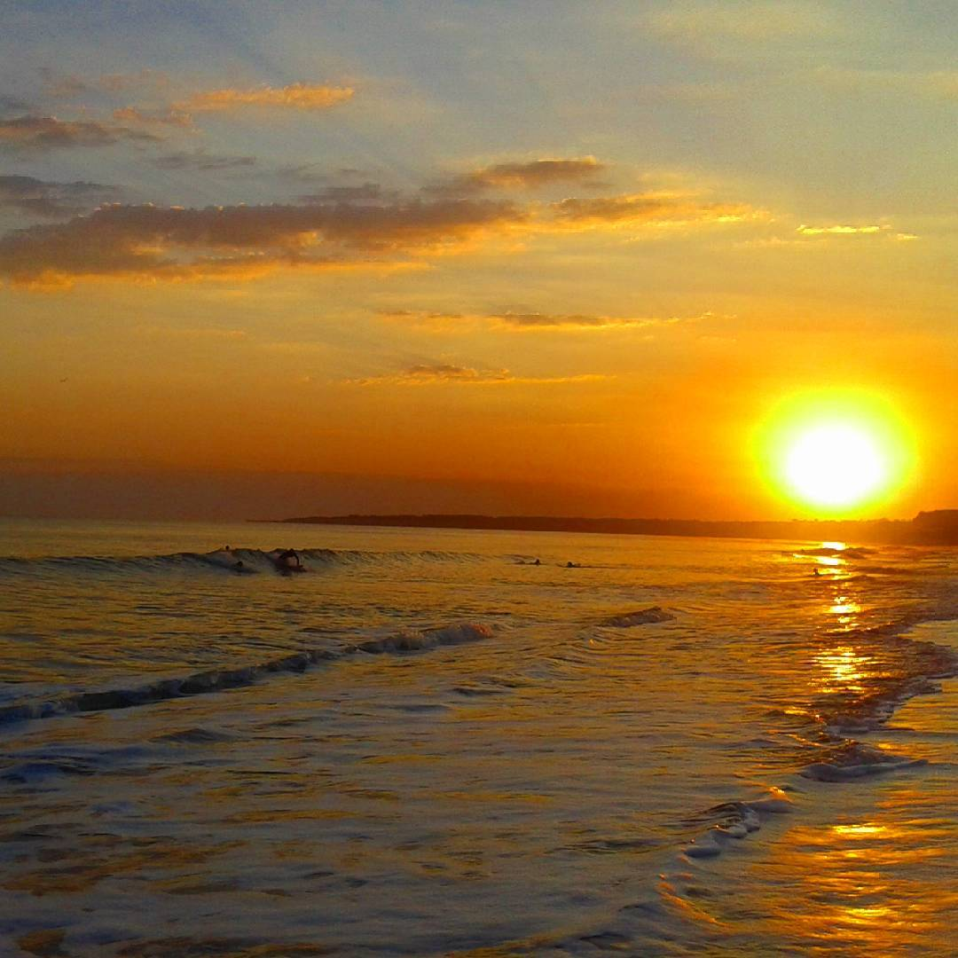 Atardecer de verano en las playas del sur de la ciudad